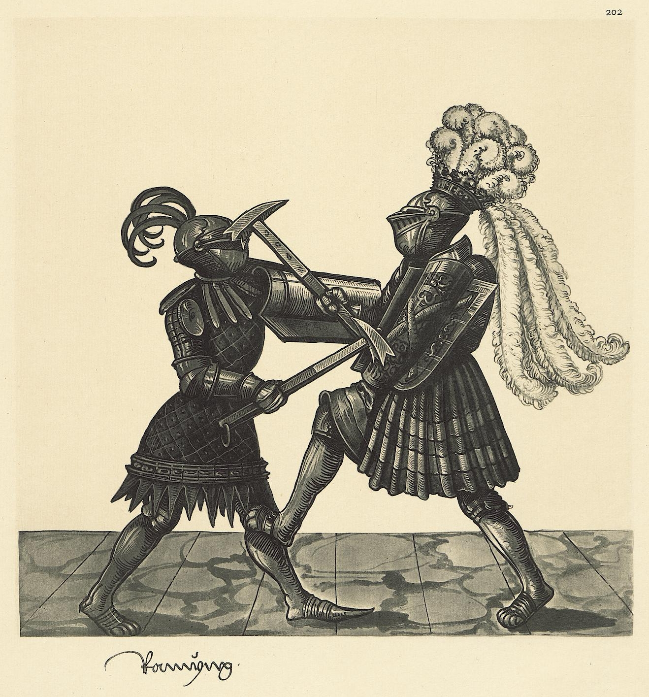 Tafel aus: Freydal: des Kaisers Maximilian I. Turniere und Mummereien; mit einer geschichtl. Einleitung. Tafeln. Wien, 1882. Exemplar der UB Tübingen. (Faksimileedition des Turnierbuchs Freydal, Kunsthistorisches Museum Wien, Signatur: K.K. 5073) Tafel 202 Ramyng